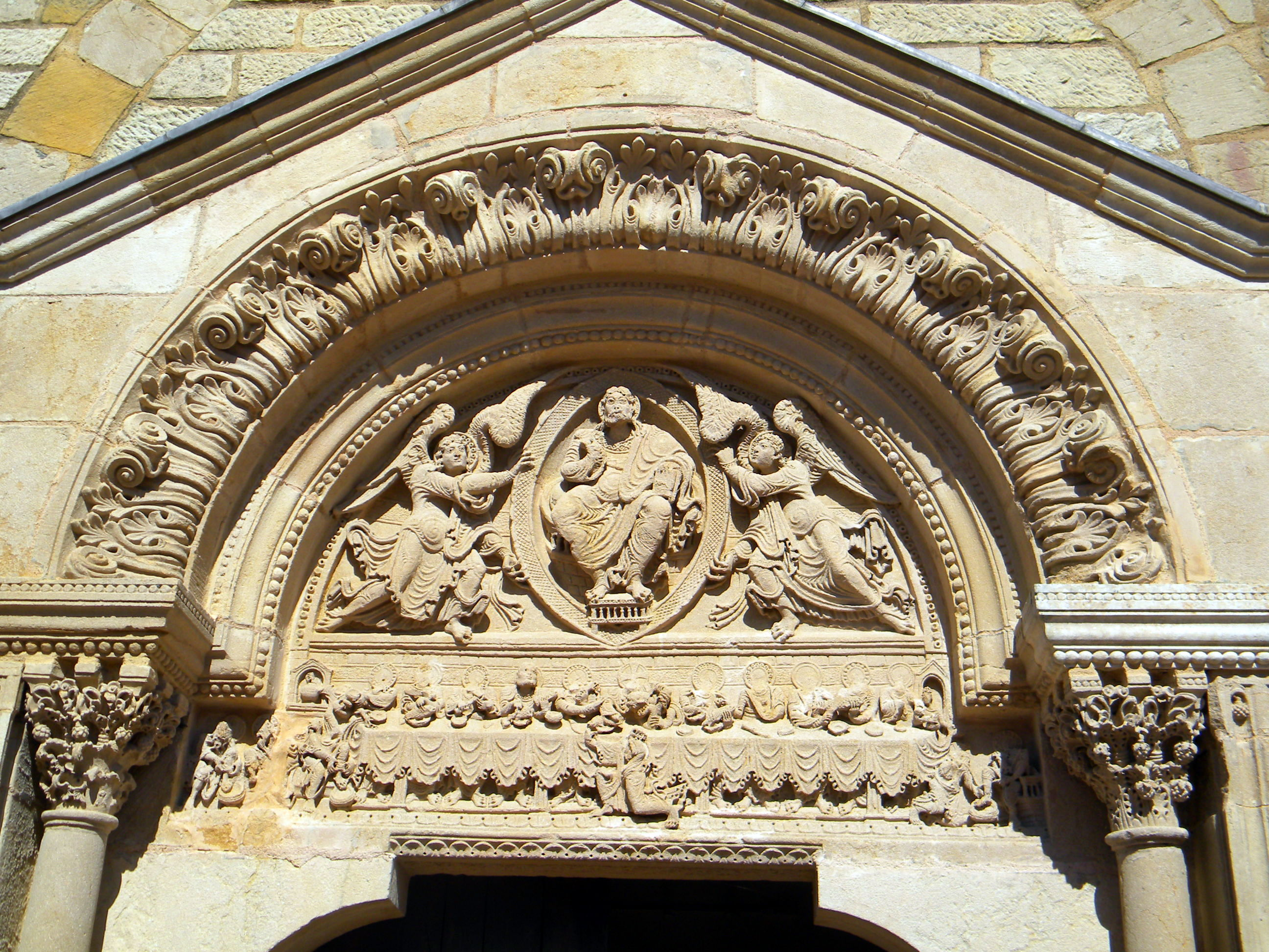 Tympan roman du XIIe siecle